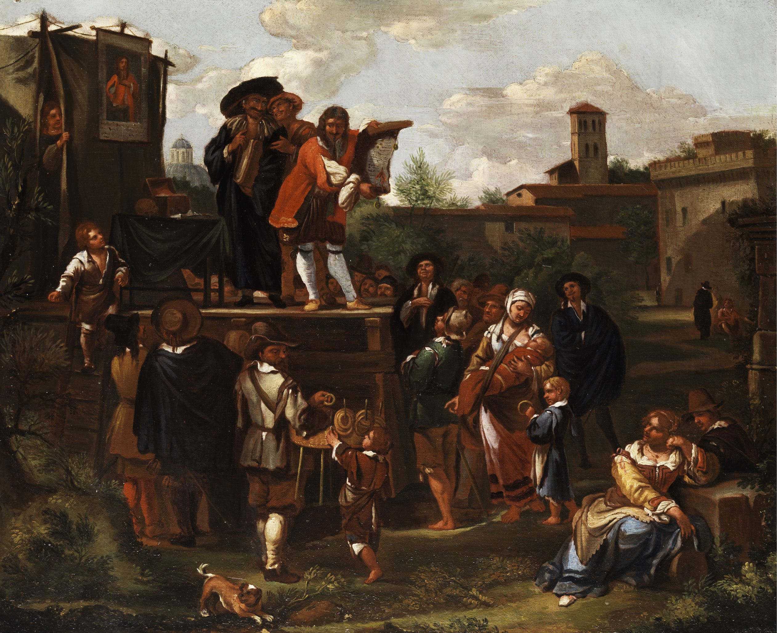 Theateraufführung im Freien